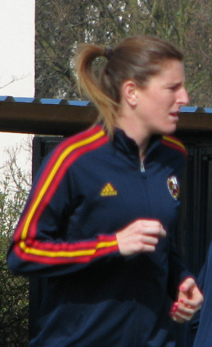 Adriana Martin Santamaria, spanische Nationalspielerin